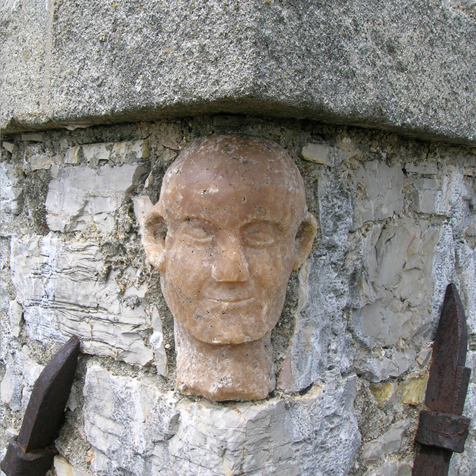 Faccia posta sul campanile di Petricci (Semproniano, GR)all'altezza di 15 mt vista di fronte